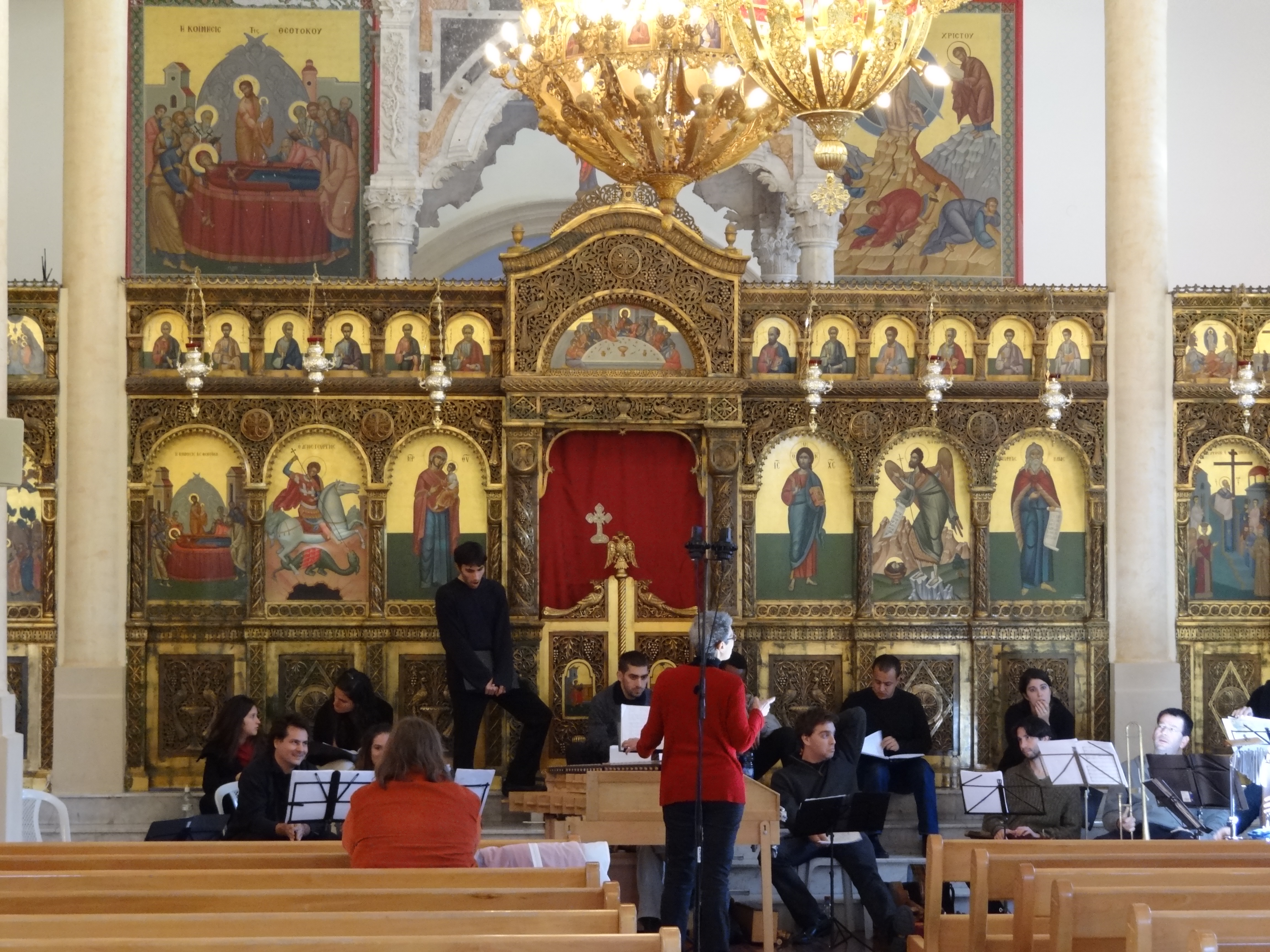 St. Elias Cathedral of the Melkite Catholic Haifa Israel קתדרלת אליהו הנביא של הכנסייה המלכיתית היוונית-קתולית בחיפה